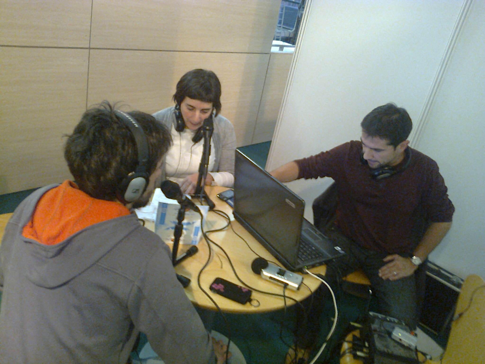 Euskal Irratiakeko esatariak 2011ko Durangoko Azokan